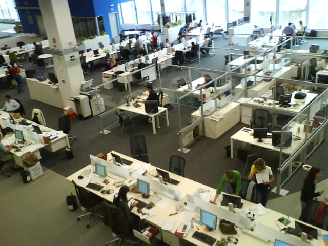 Radio Euskadi en Bilbao, Vizcaya, País Vasco, España.